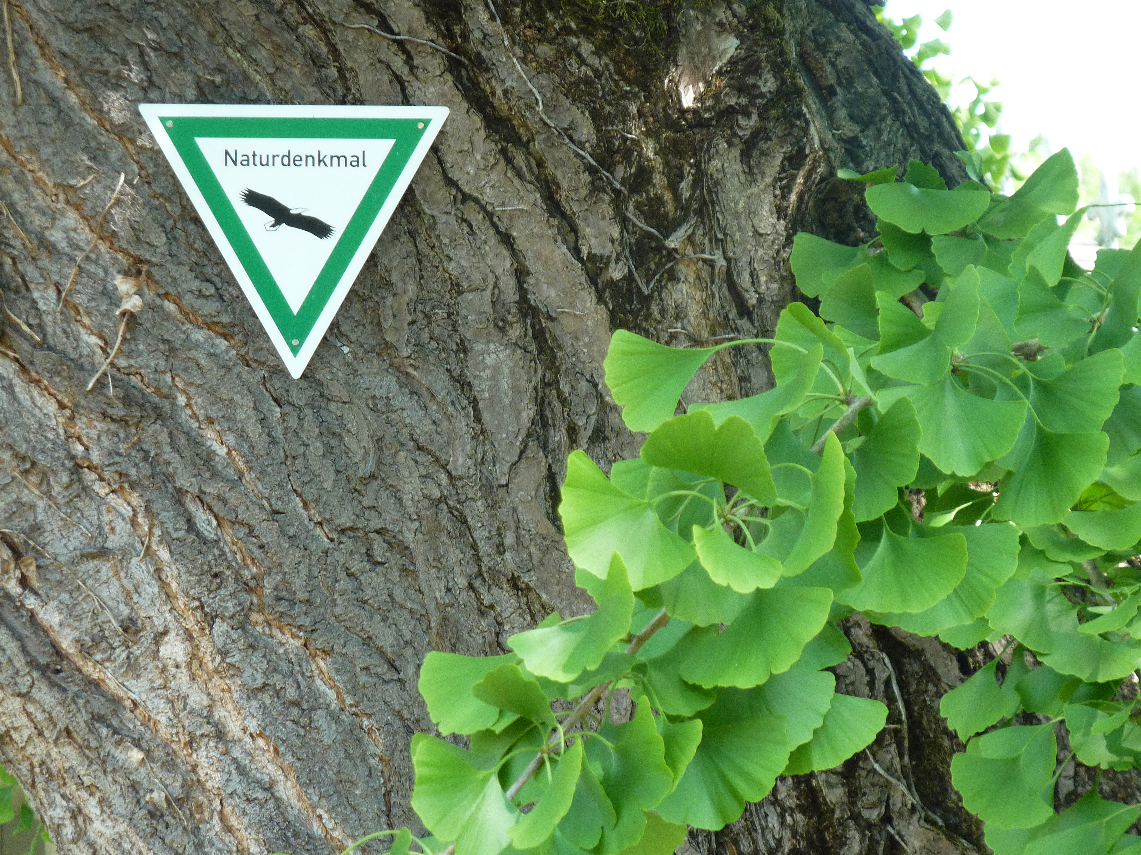 Frankfurt am Main, Stadtteil Rödelheim: Der Ginkgo in Rödelheim ist ein im Jahr 1750 gepflanztes Exemplar der aus China stammenden Baumart Ginkgo biloba. Der rund 18 Meter hohe Einzelbaum steht in Alt-Rödelheim auf dem Grundstück des Petrihauses am Ufer des Flusses Nidda, gegenüber dem Brentanopark. Dieser Ginkgobaum gilt als das älteste Exemplar seiner Art in Deutschland und hat den Status eines Naturdenkmals. Der Baum ist nur eingeschränkt für die Öffentlichkeit zugängig.